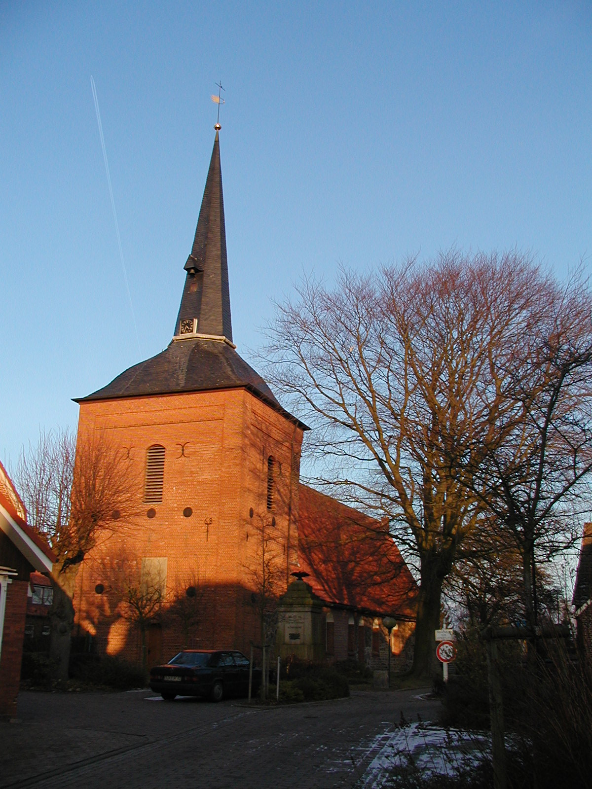 Die Kirche in Belum